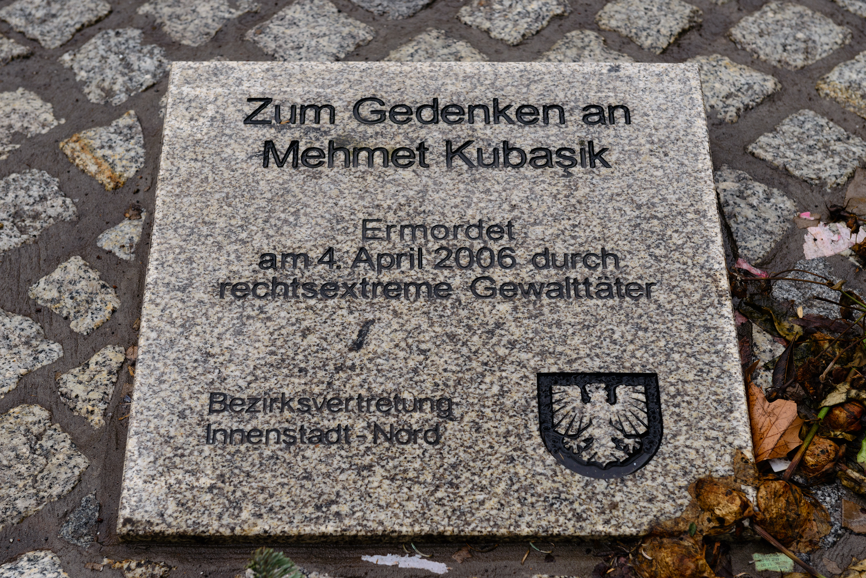 Am 4. April 2006 wurde Mehmet Kubasik von Rechtsextremisten in seinem Kiosk in der Mallinckrodtstraße 190 in Dortmund ermordet. Eine Gedenktafel vor dem ehemaligen Kiosk erinnert an das NSU-Mordopfer.